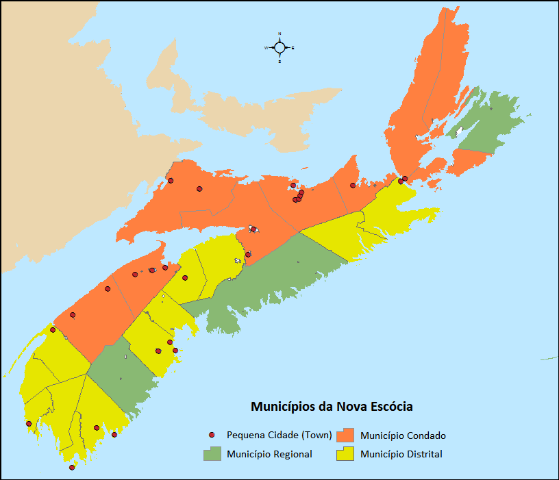 Distribuição dos 50 municípios da Nova Escócia (3 municípios regionais, 9 municípios condado, 12 municípios distritais e 26 pequenas cidades), utilizando os limites das subdivisões do censo de 2016 da Statistics Canada.